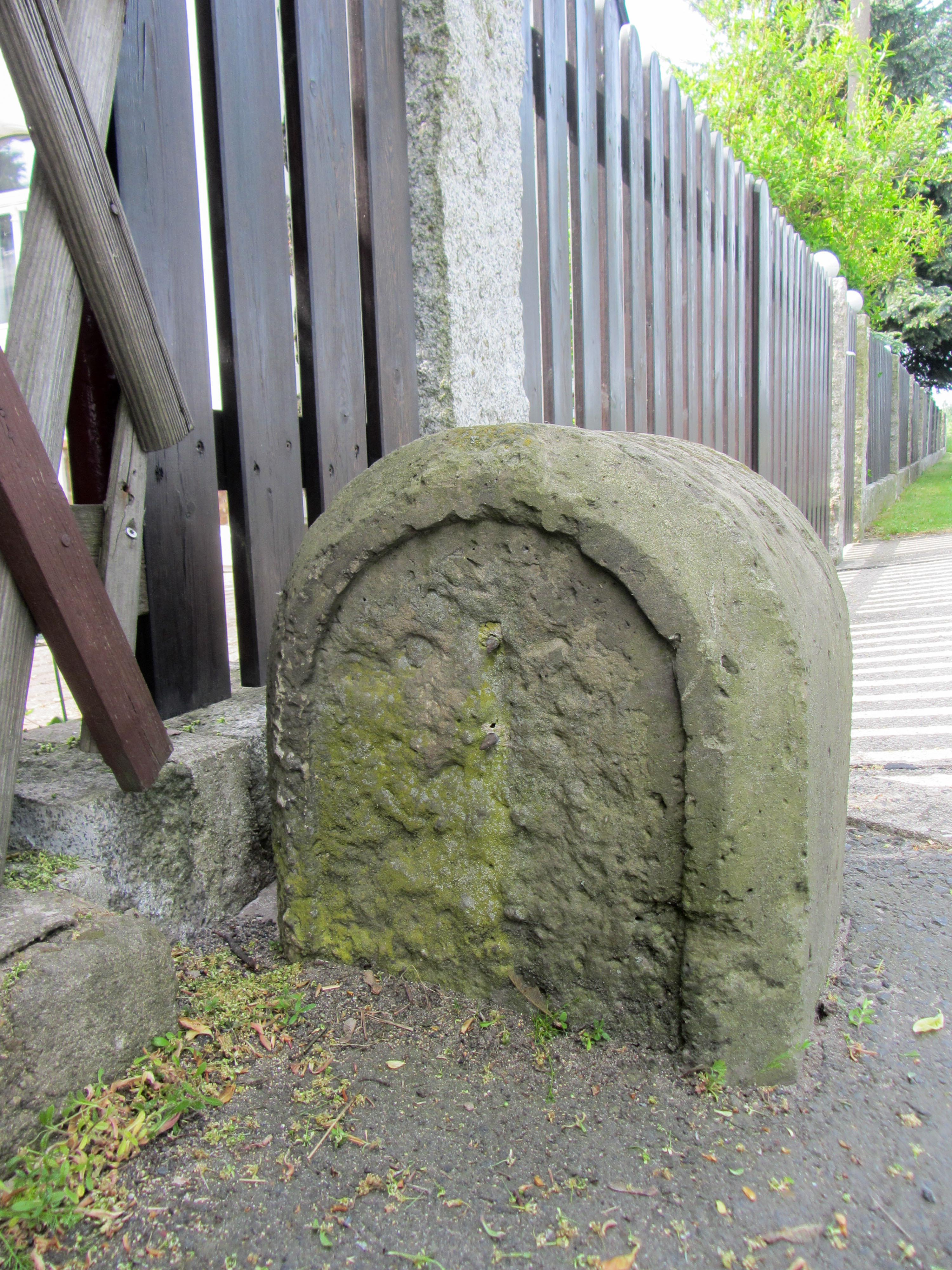 Königlich-Sächsischer Ganzmeilenstein an der S11 in Kleinbardau, halb im Gehsteig versenkt